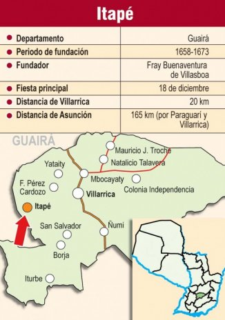 Descripción de como llegar a Itape